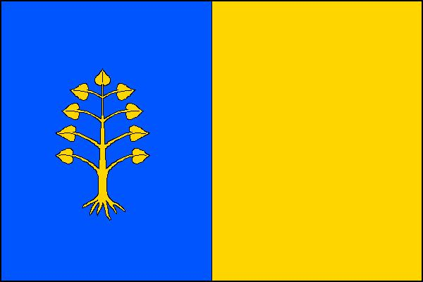 Vlajka Obce Dolní Tošanovice